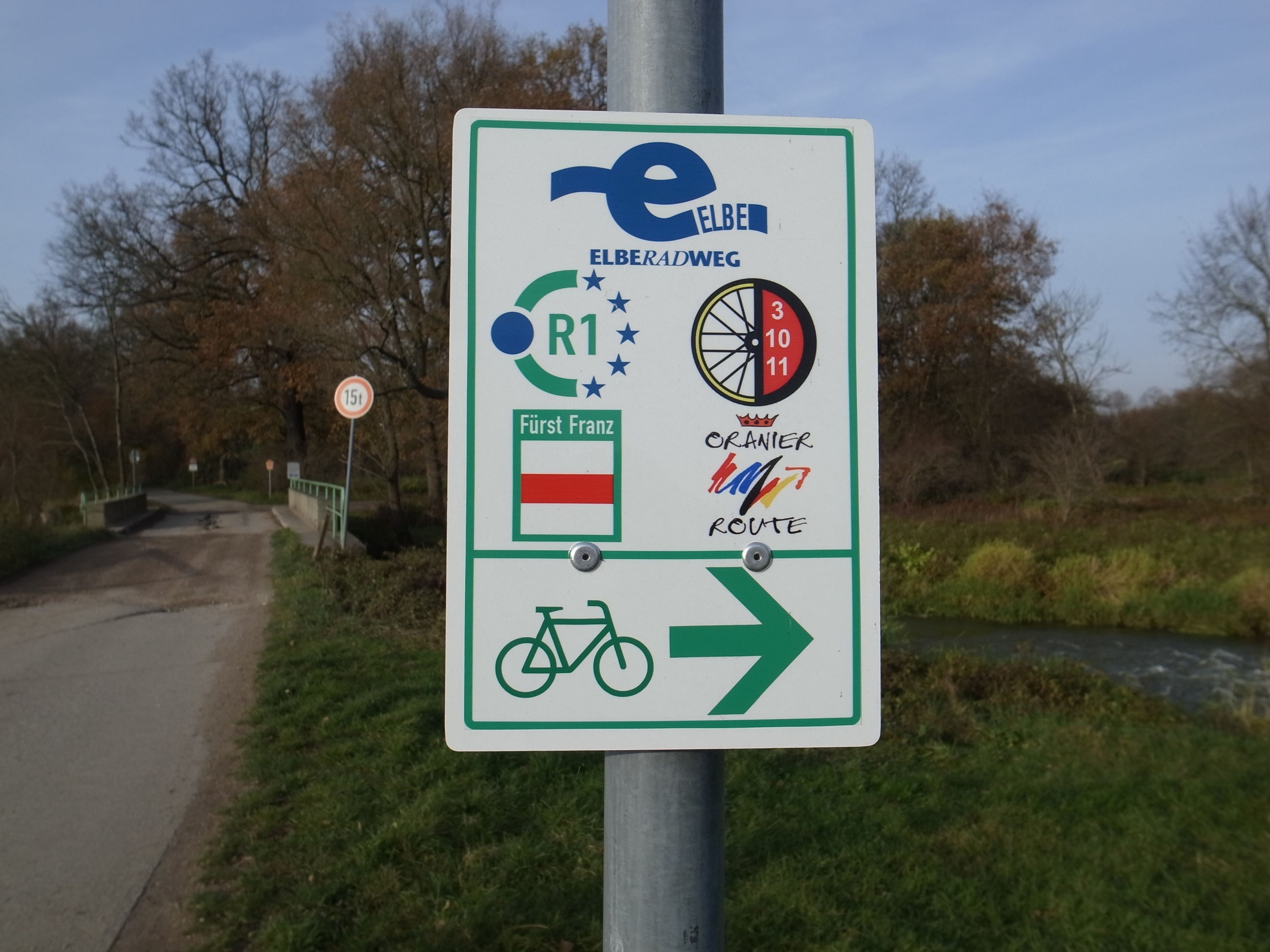 Dessau, Wegweiser für die Radwanderwege Elberadweg, Europaradweg R1, D-Routen 3 10 11, Gartenreichtour "Fürst Franz" und Oranier-Route an der Kuhbrücke